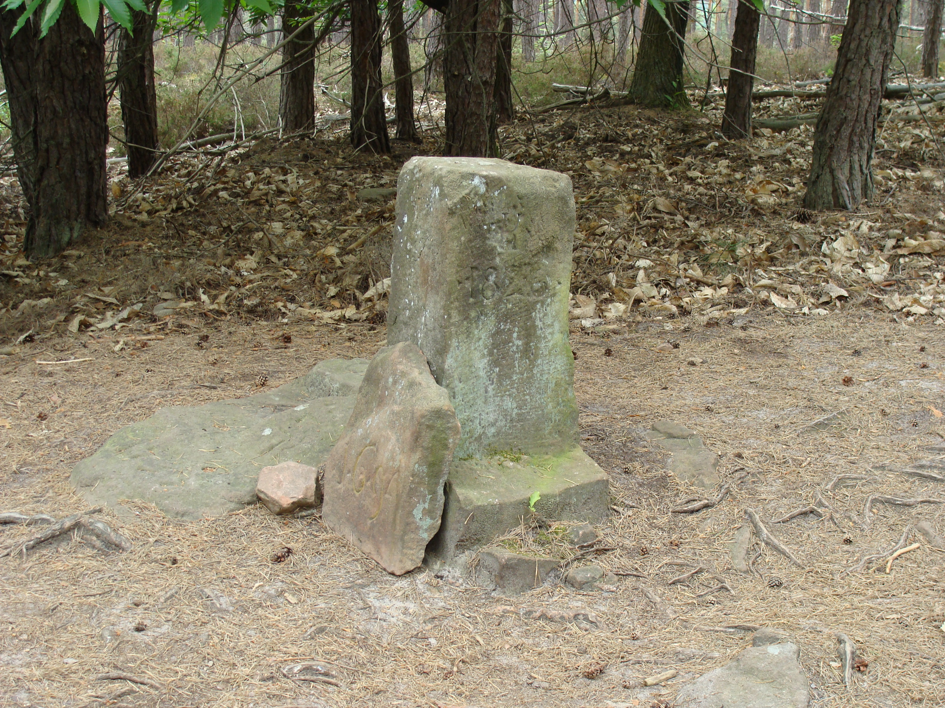 Grenzstein am Stabenberg (Pfälzerwald)